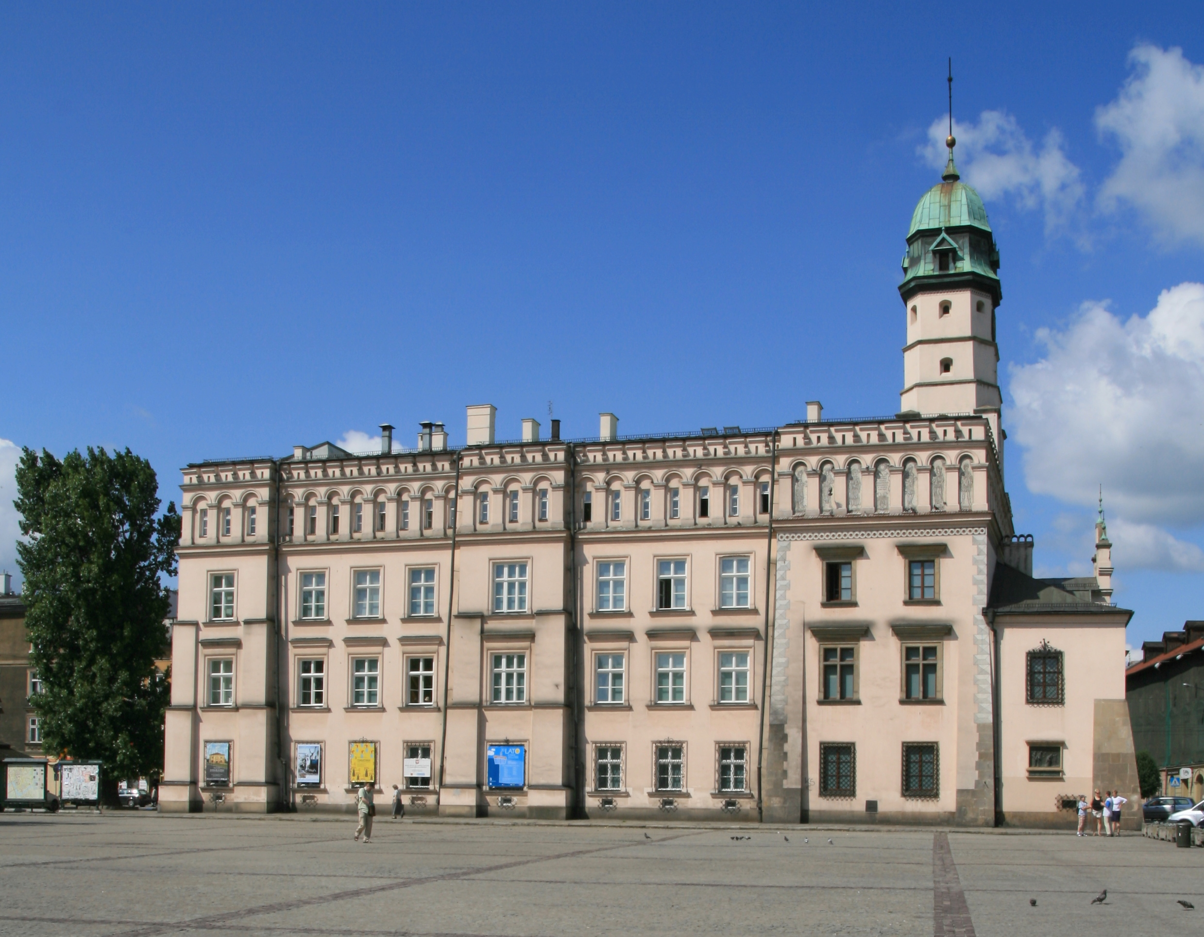 Ratusz Kazimierski, widok od strony placu Wolnica